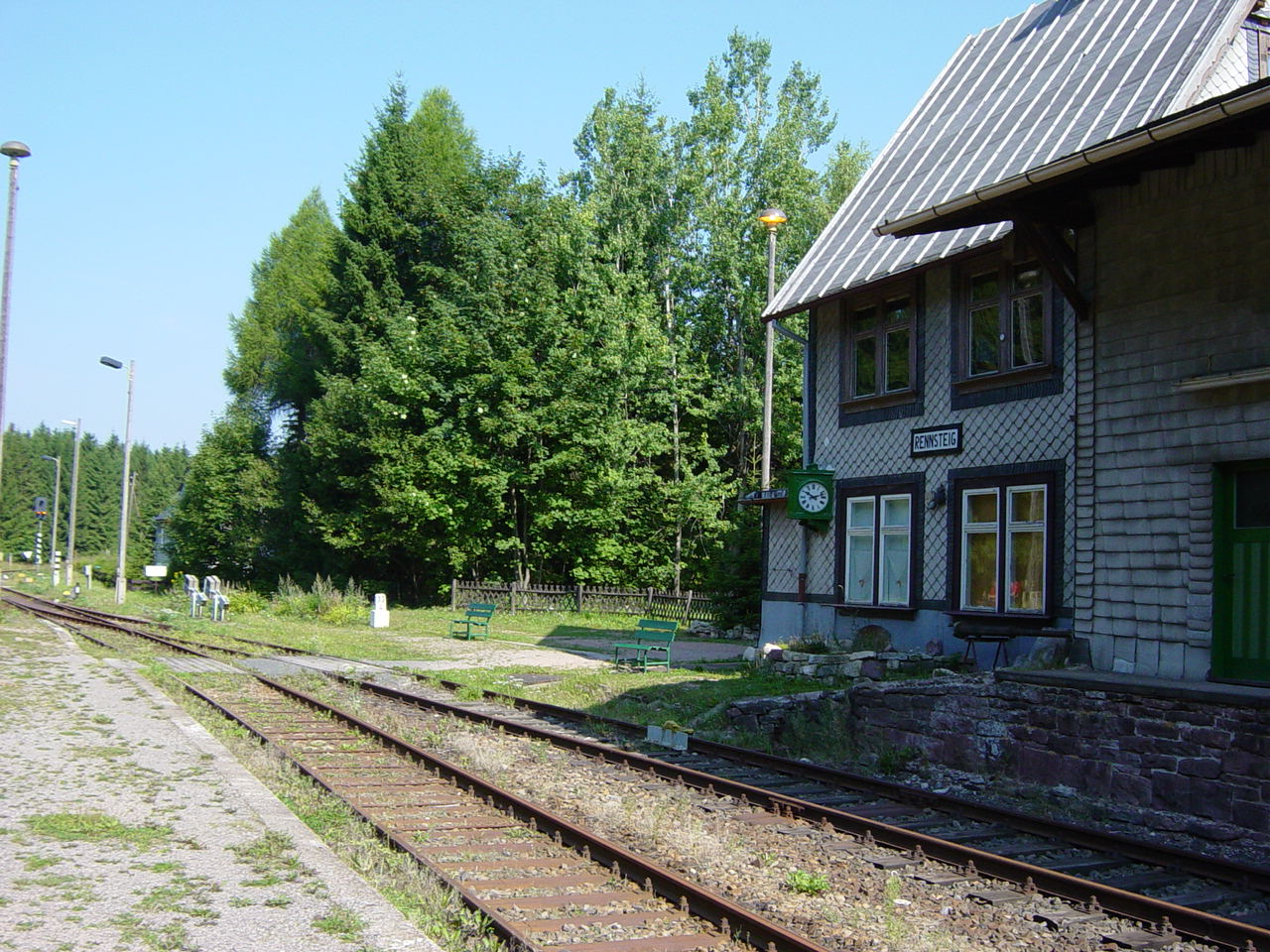 Der Bahnhof Rennsteig im Thüringer Wald. Thüringen, Deutschland. selbst fotografiert am 03.08.2003 GNU-FDL